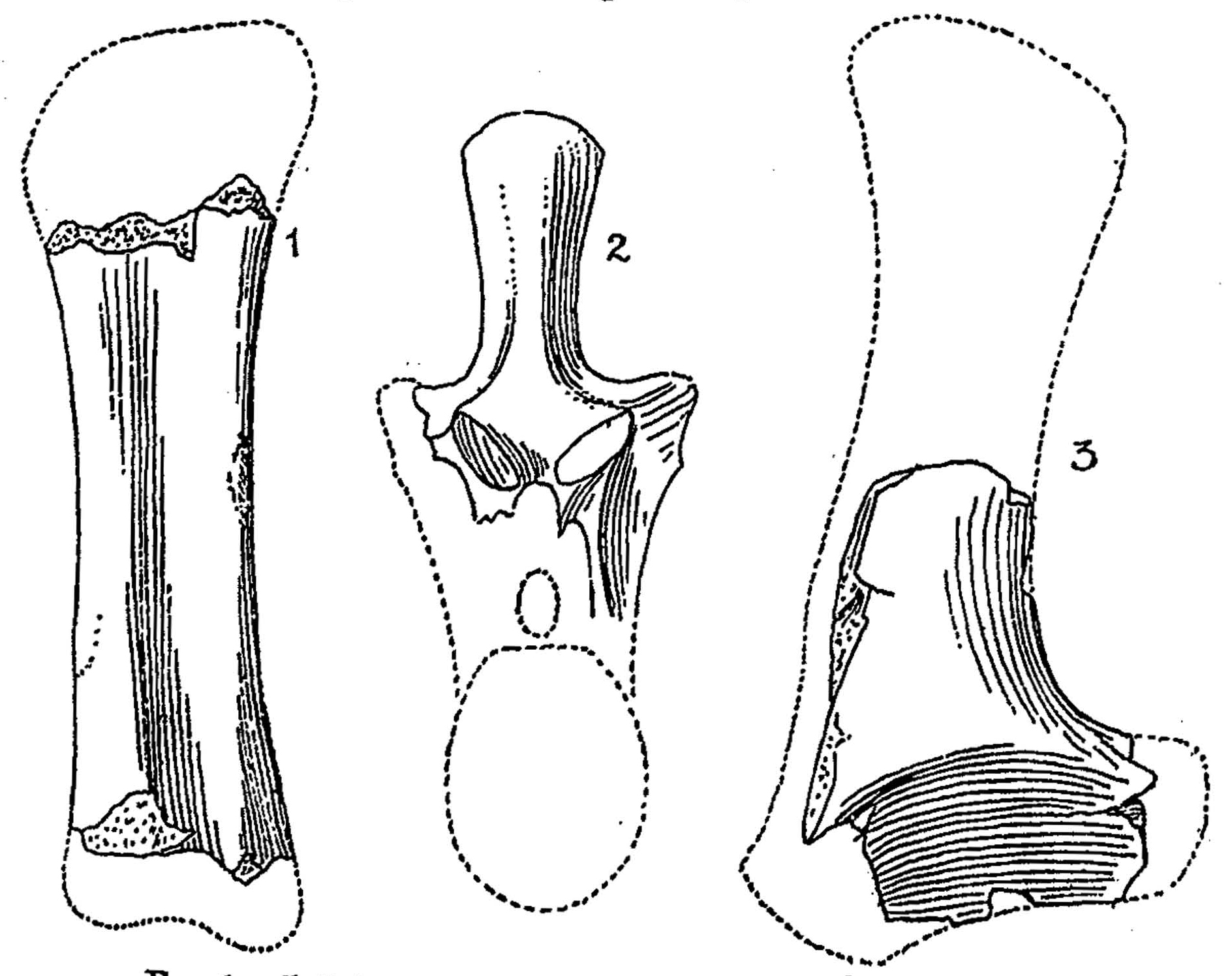 Algoasaurus bauri left femur, posterior dorsal vertebra and right scapula, all 1/7th natural size.